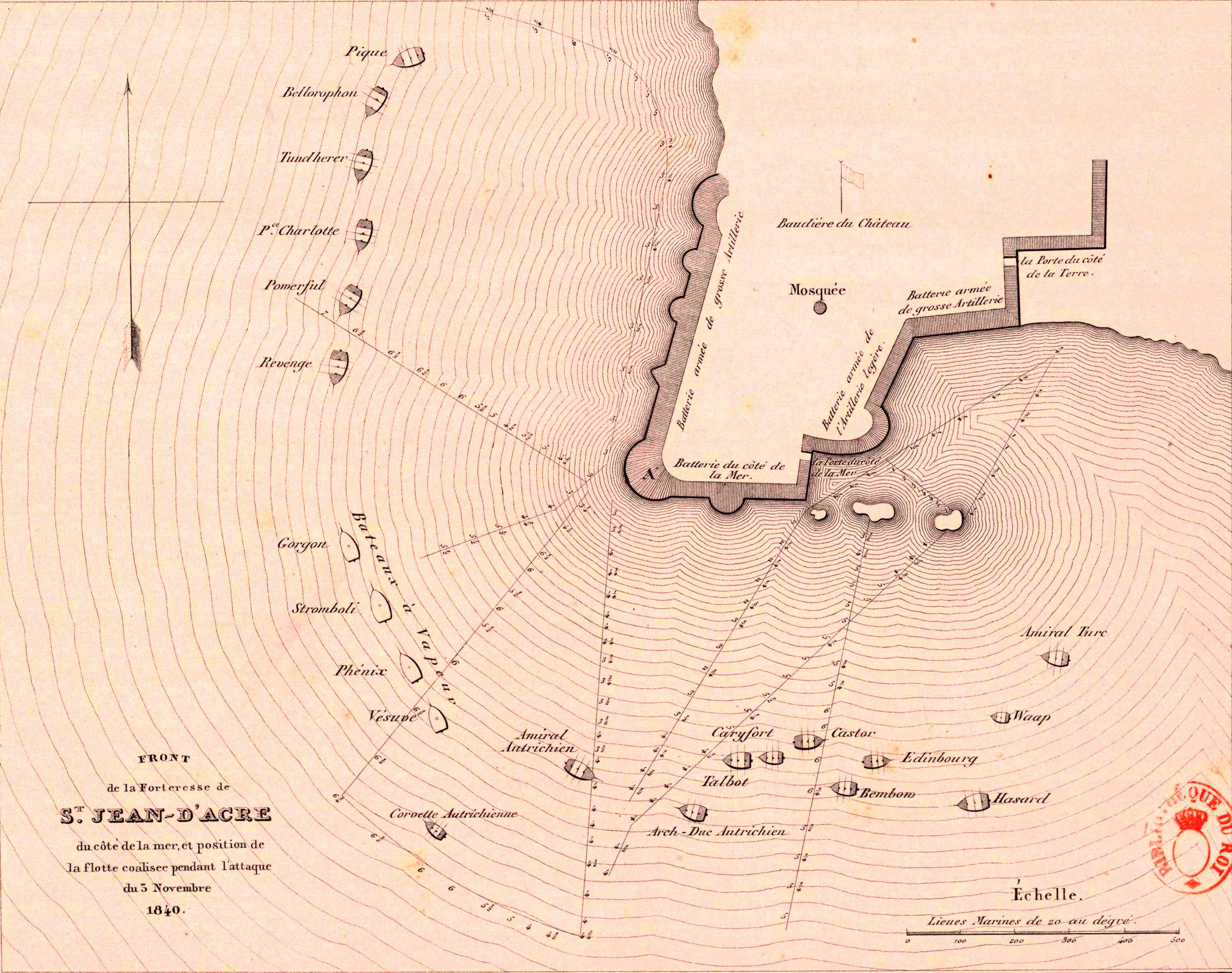 Front de la forteresse de St Jean d'Acre du côté de la mer, et position de la flotte coalisée pendant l'attaque du 3 novembre 1840 / lith. de P. Bineteau ; gravé par L. Petit